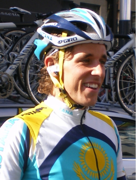 Koen de Kort - 3daagse van West-Vlaanderen 2008